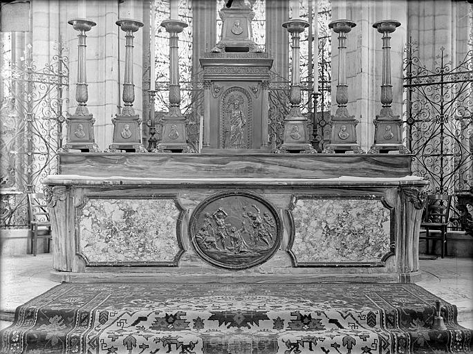 Maître-autel, vue d'ensemble